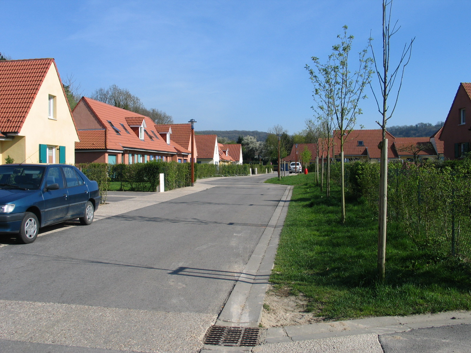 Photographie d'une voirie de lotissement sans bordure, traitement paysager de qualité au sein du Parc naturel régional des Caps et Marais d'Opale, Longfossé, Nord-Pas-de-Calais, France. Lotissement réalisé par Arietur, Wimereux.